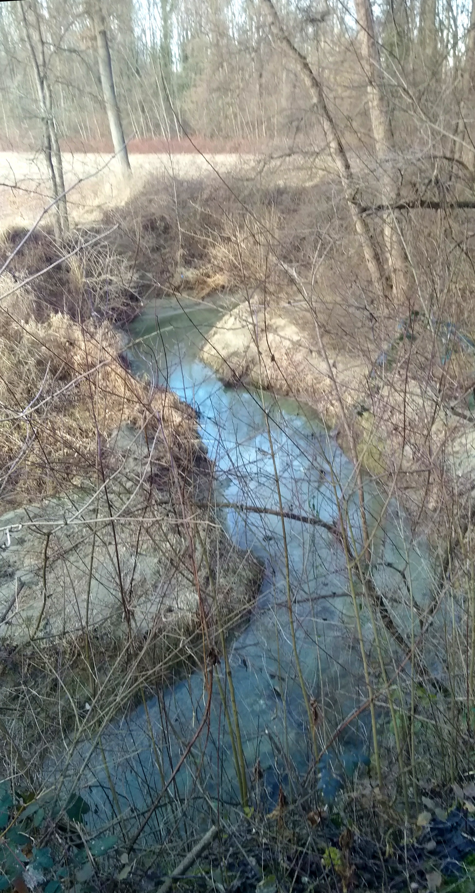 Torrente Traversola (provincia di Asti)